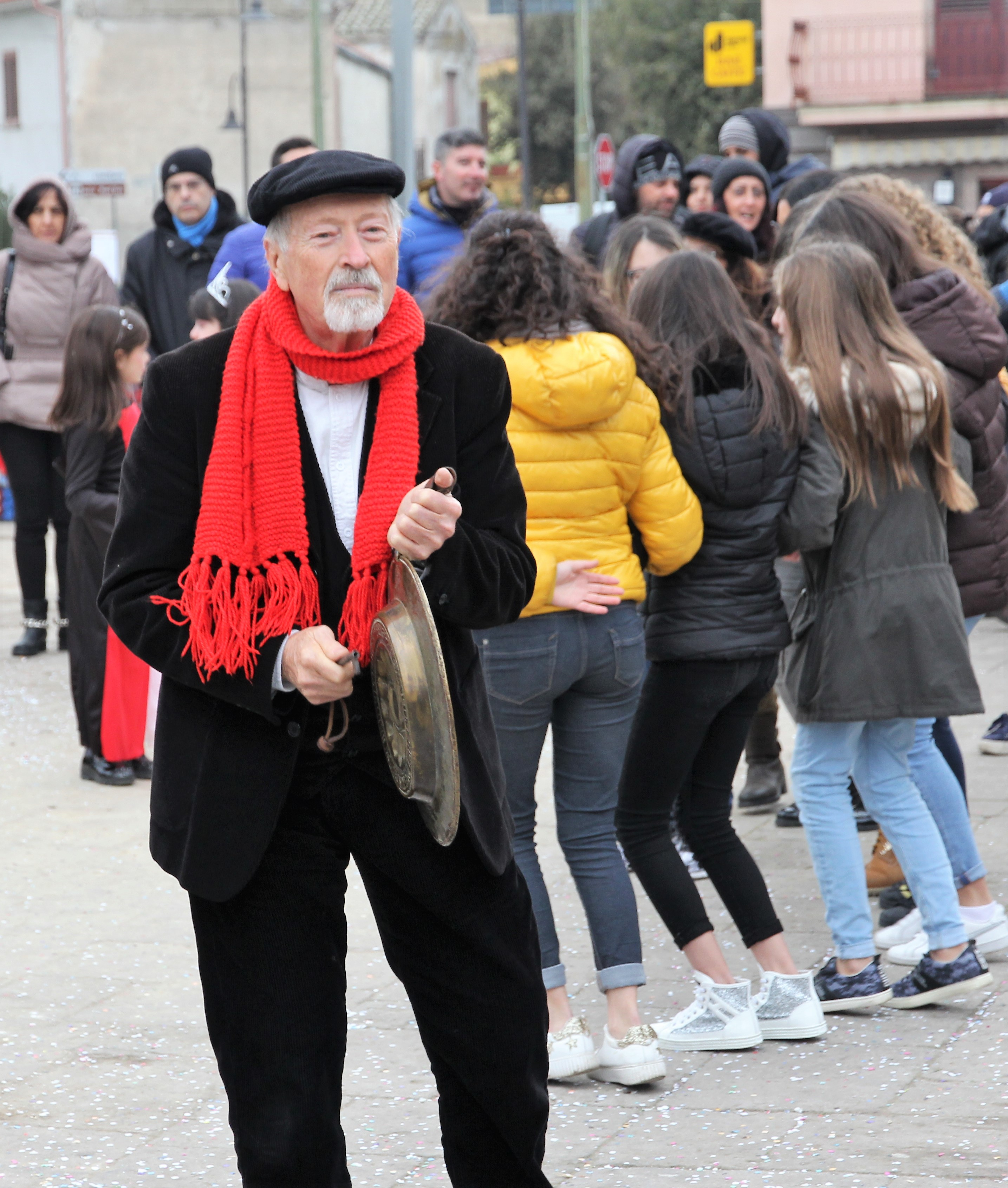 Strumento della tradizione musicale della Sardegna (Ottana 2018)